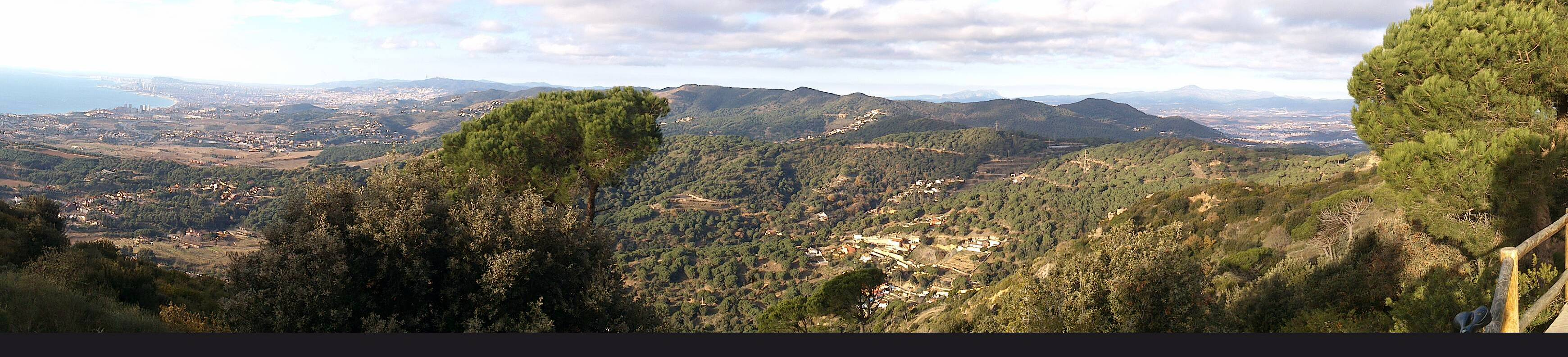 Panoramica des de el Mirador de la Cornisa de Teià. es pot veure Barcelona, Montserrat i La Mola This is a photography of a Special Area of Conservation in Spain with the ID: ES5110011. Natura2000 entry, EEA entry